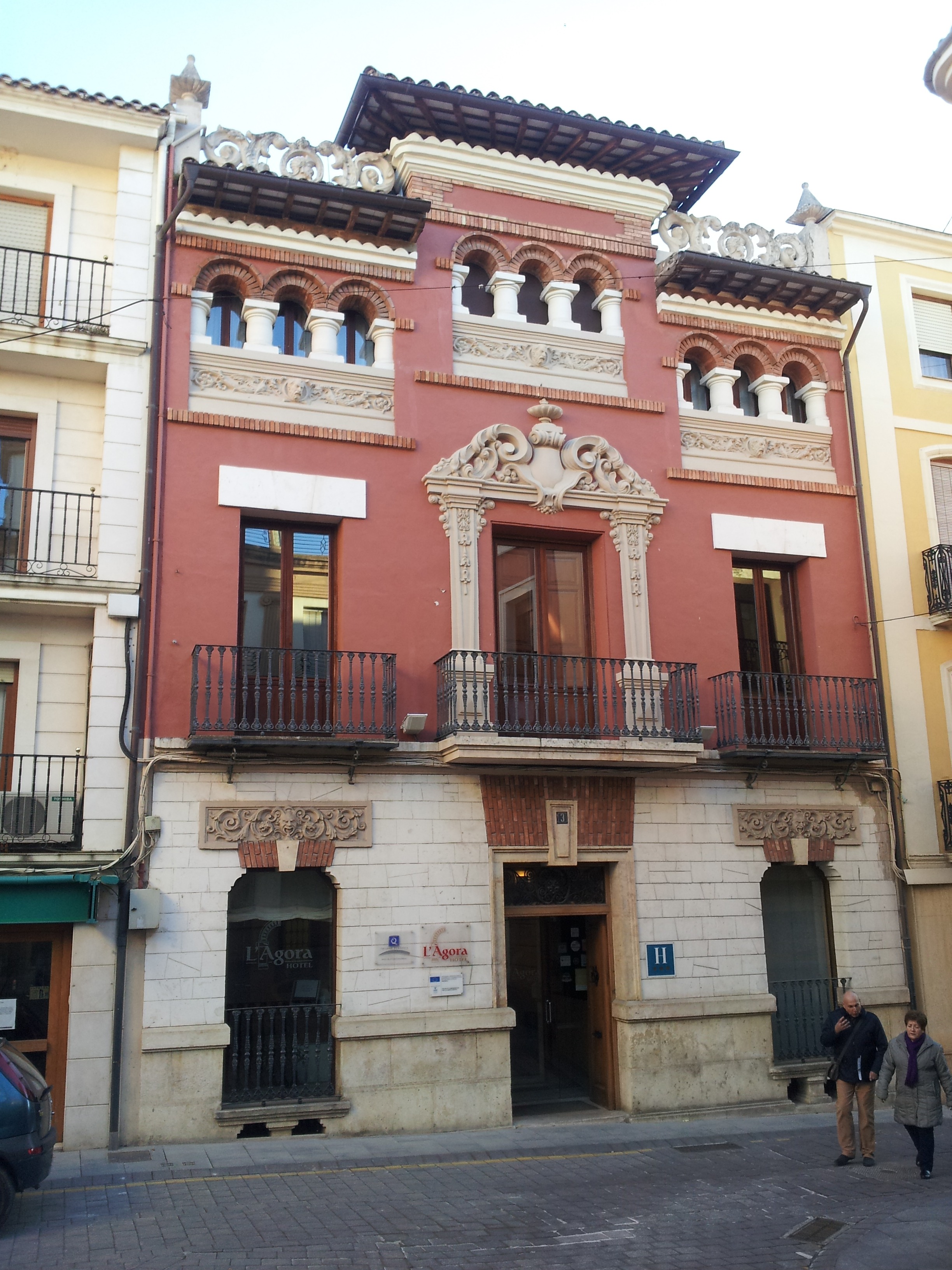 Frontera de l'Hotel L'Agora, Bocairent (Valéncia).